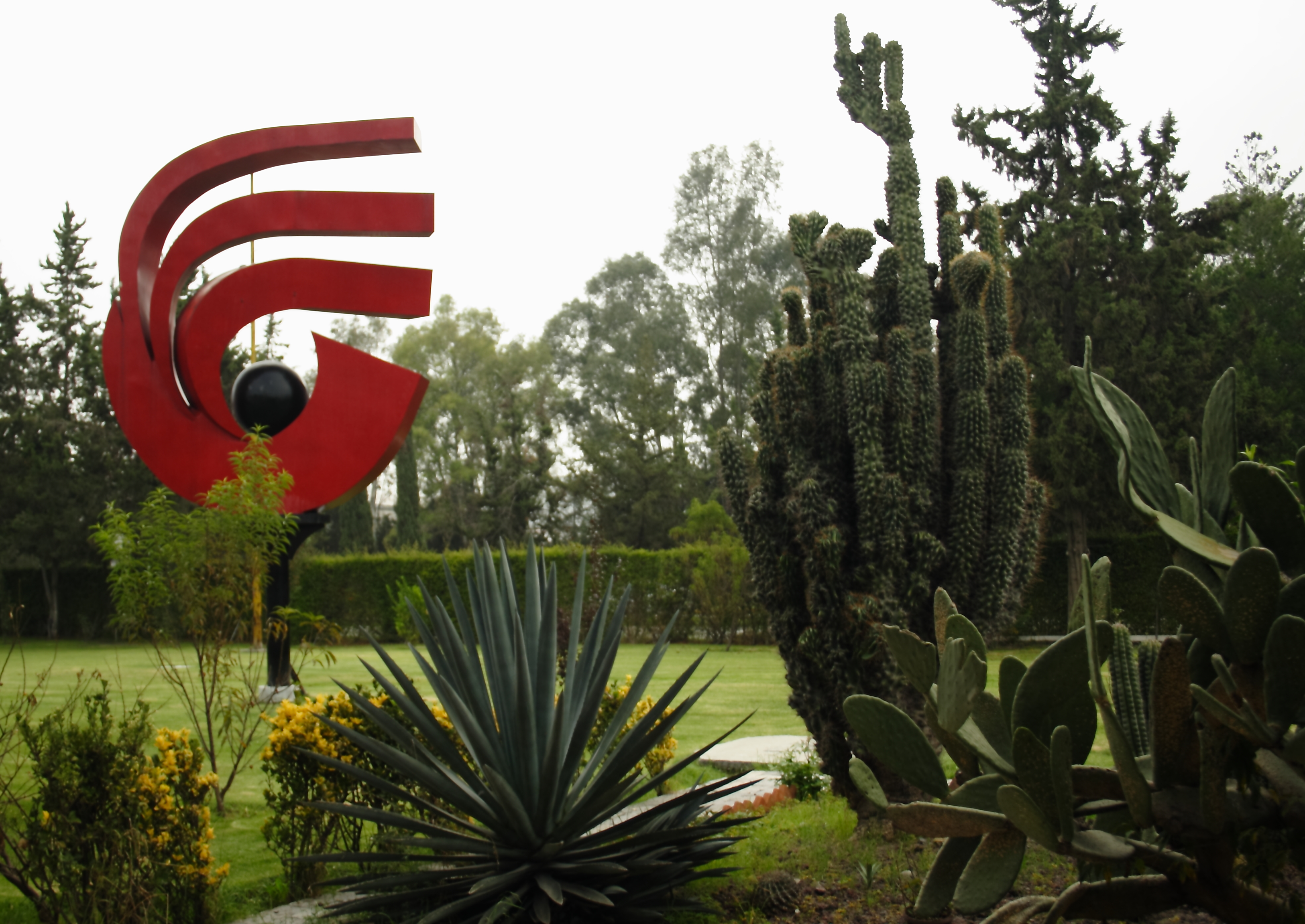 Unidad de seminarios en FES Cuautitlán, México.